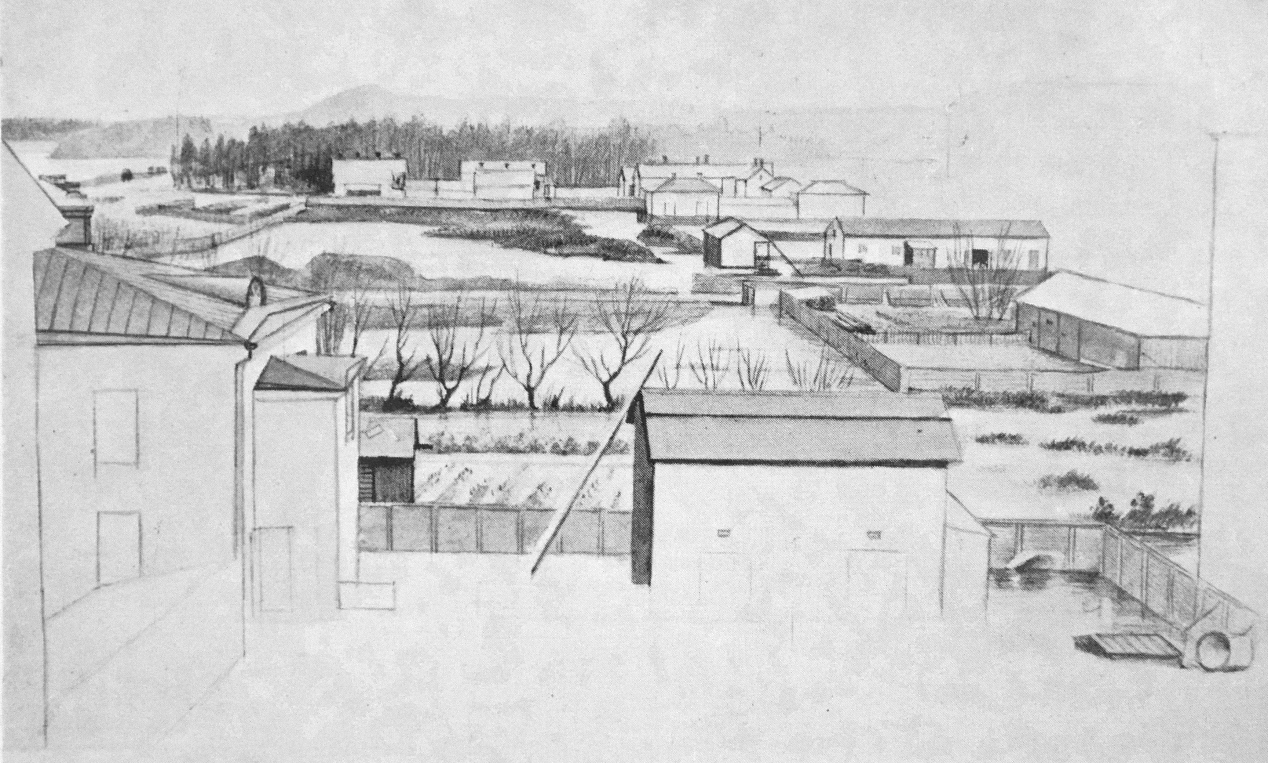 M. v. Wrightin vesivärimaalaus Rautatientorilta 1840-luvulta.